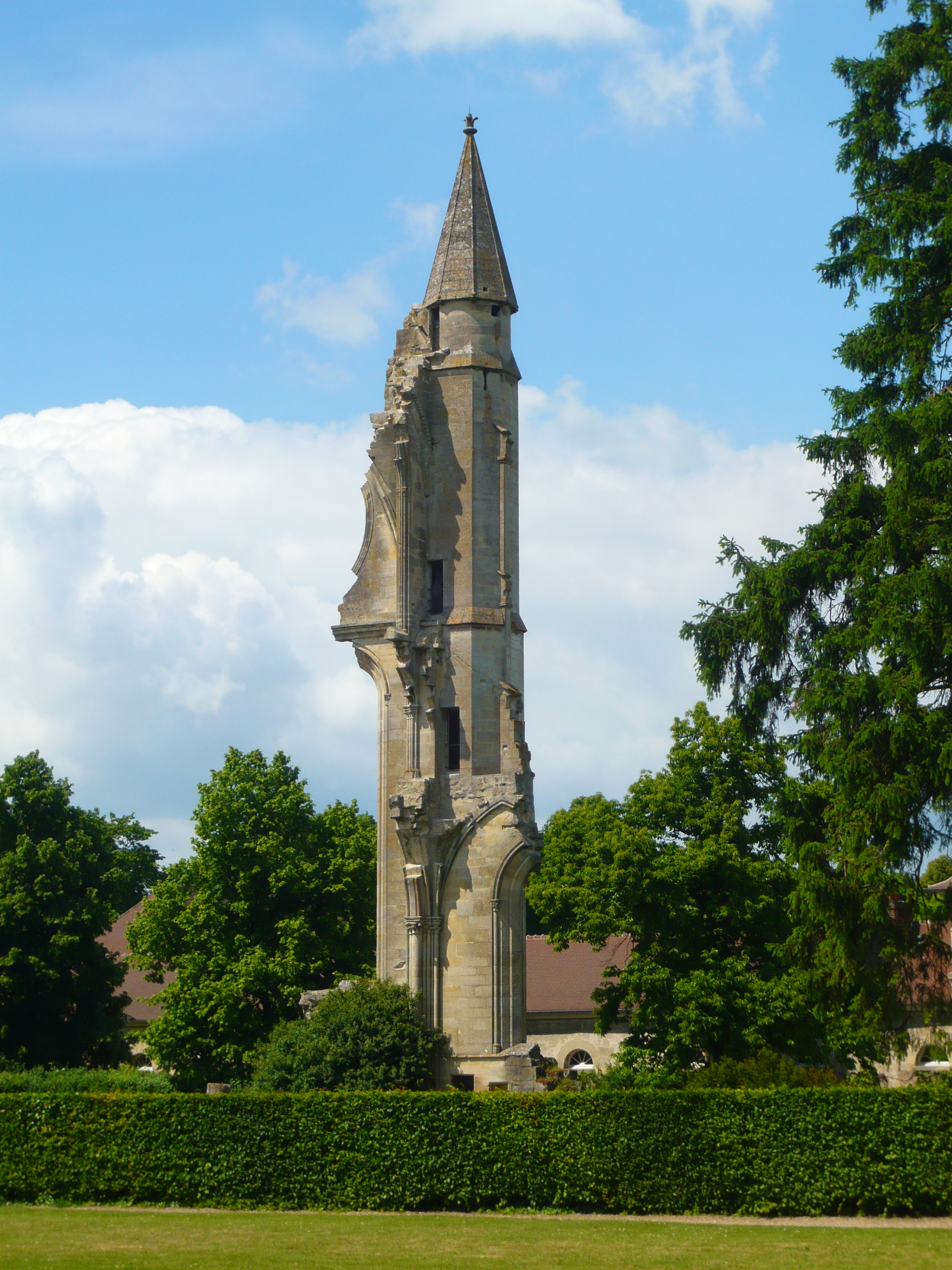 Tourelle avec un escalier en colimaçon qui marquait l'extrémité nord-est du transept, ayant résistée à la démolition qui se faisait en attelant des bœufs aux colonnes pour ainsi provoquer l'éffondrement de l'édifice.